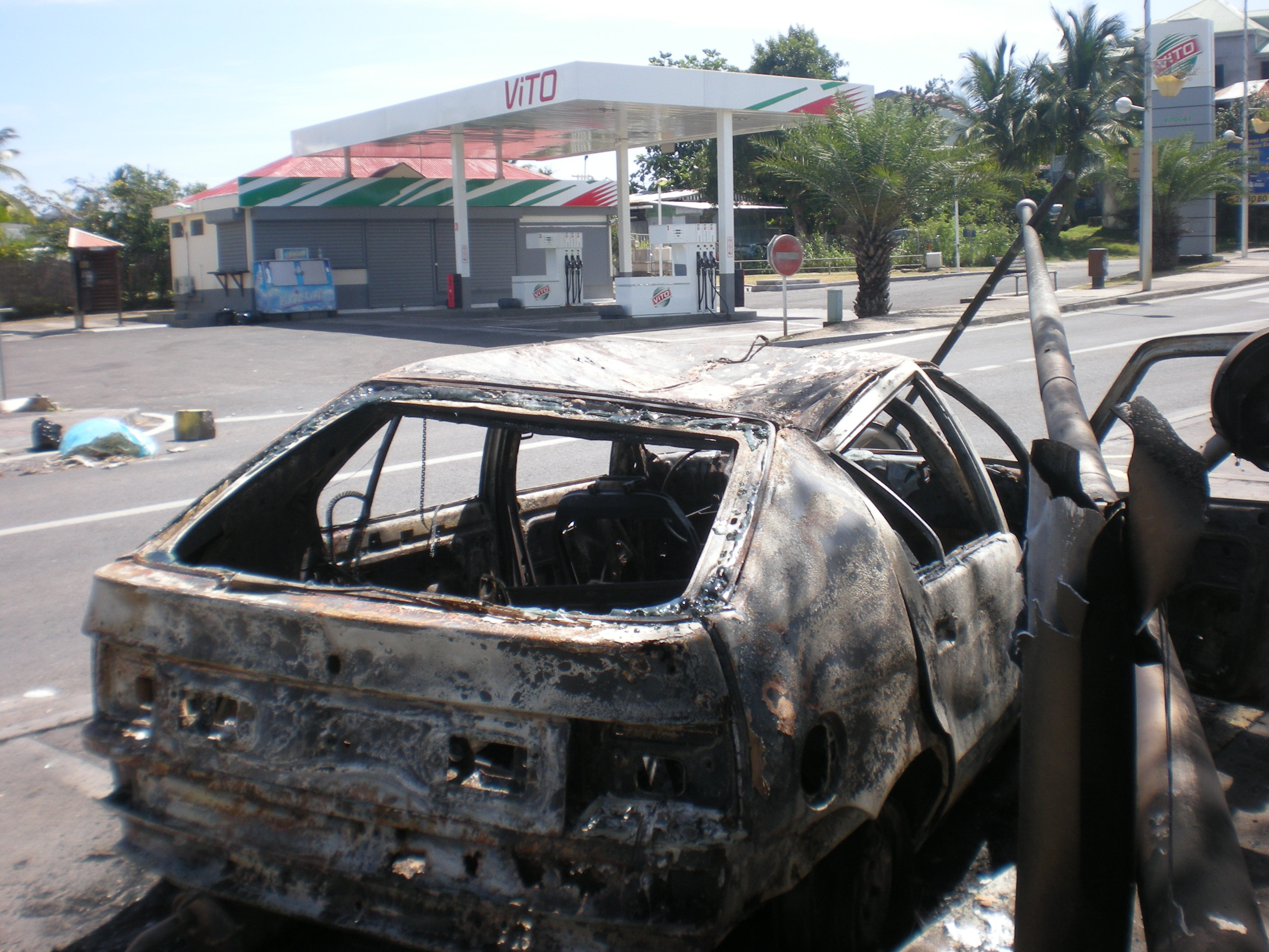 Voiture incendiée à Gosier, Guadeloupe.